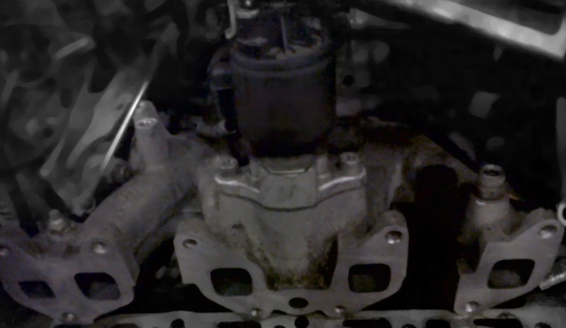 Collettore d'alimentazione della Opel Corsa B 1.2 a benzina, munita di valvola EGR, la quale riceve i gas di scarico dal condotto presente tra i due condotti centrali del collettore, questo condotto riceve i gas di scarico direttamente dalla testata, tramite un condotto che transita tra i condotti d'alimentazione della testata e sfocia nel condotto di scarico della testata.